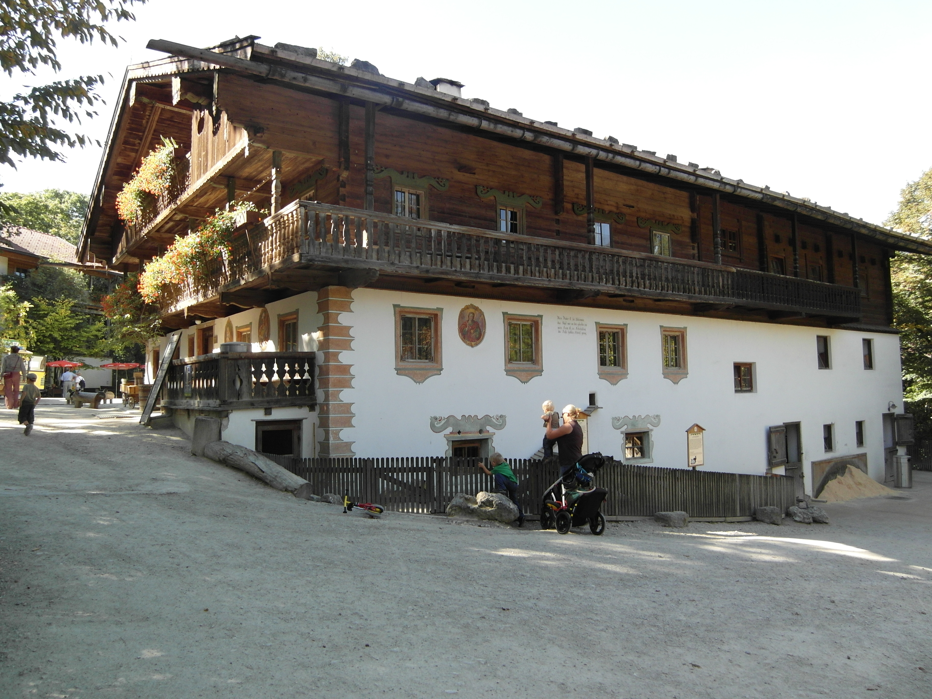 Tirolerhof im Tiergarten Schönbrunn, Wien